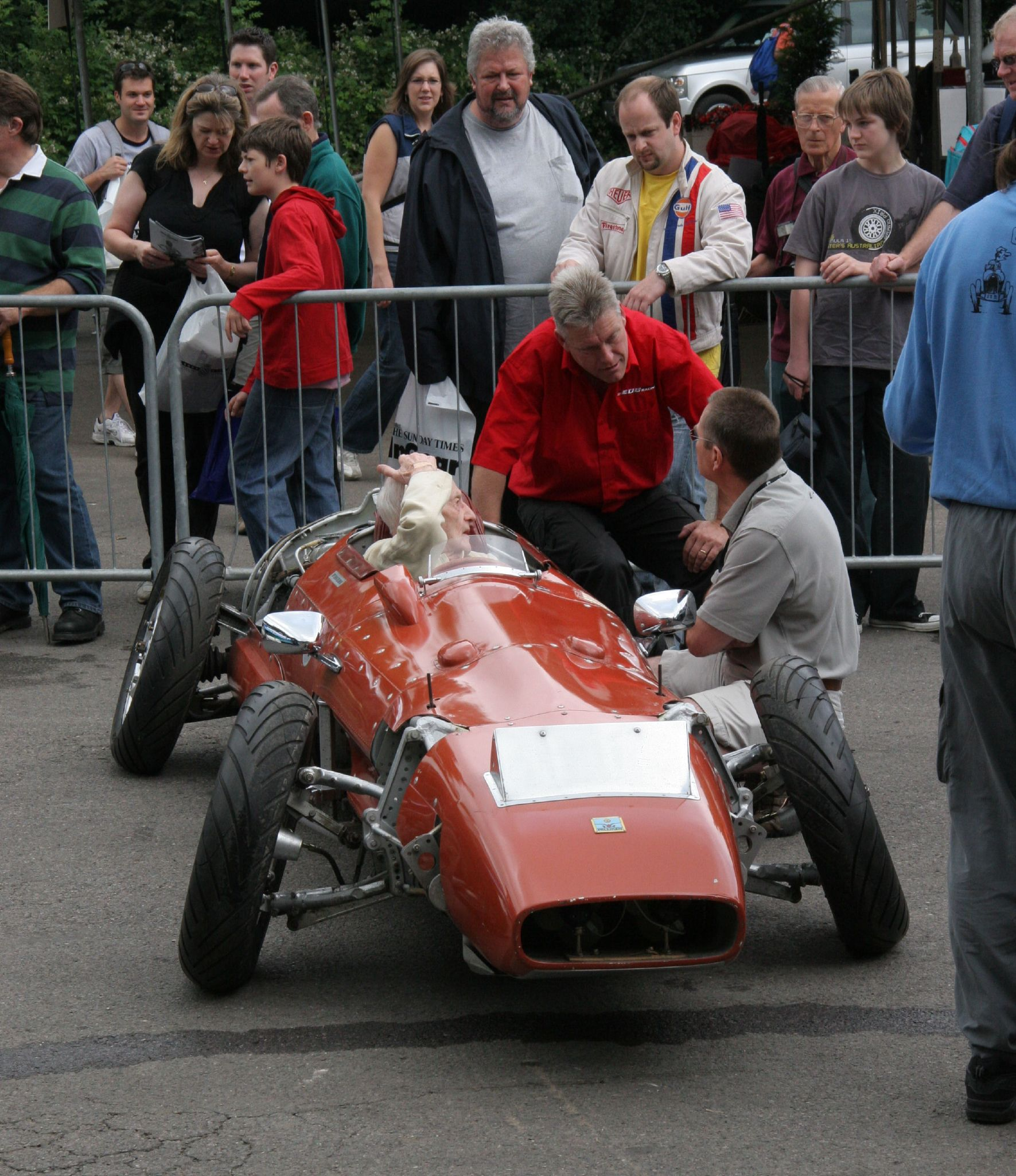 Milliken MX1 Camber Car 1960 driven by Bill Milliken.